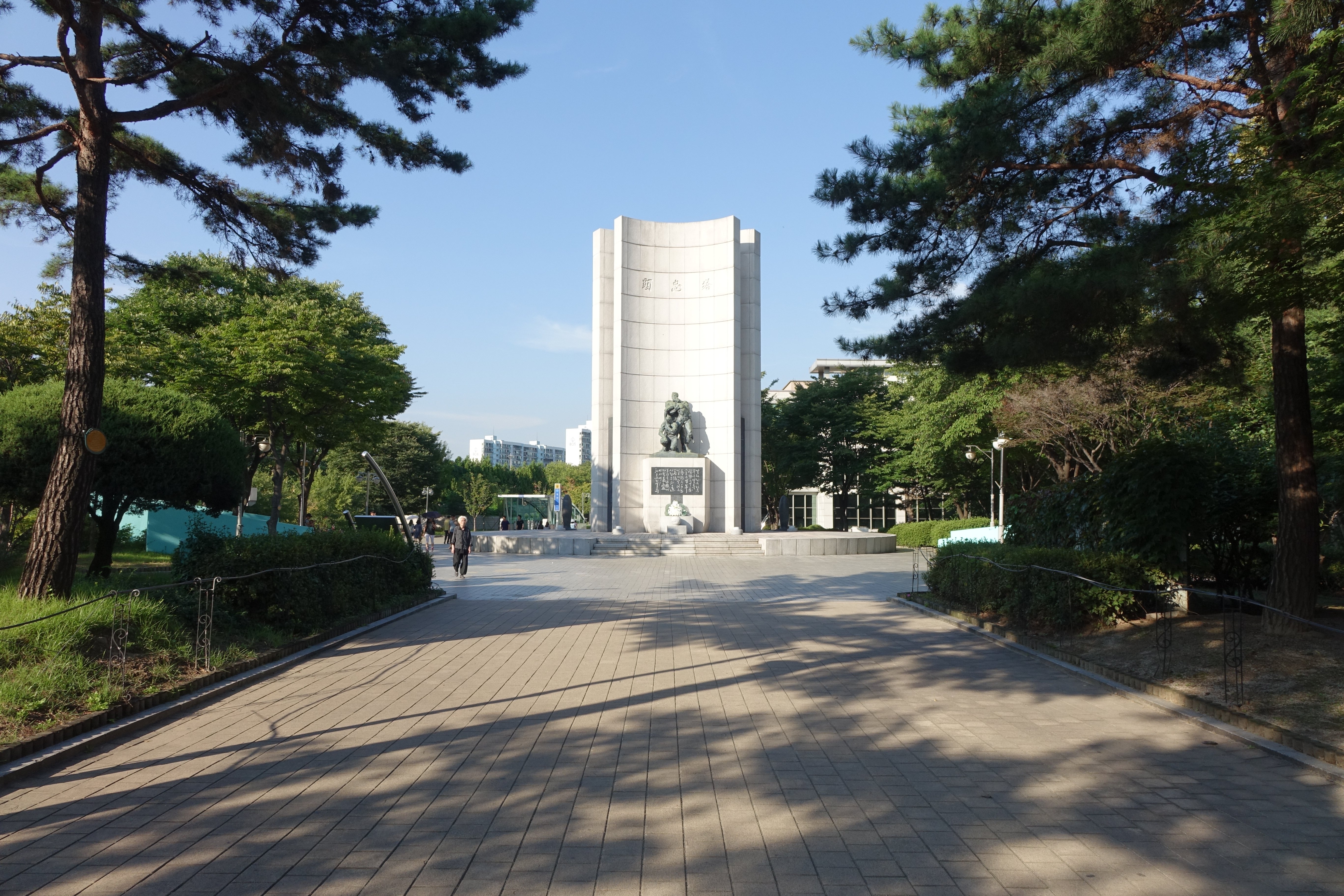 2014년 9월 경기도 과천시